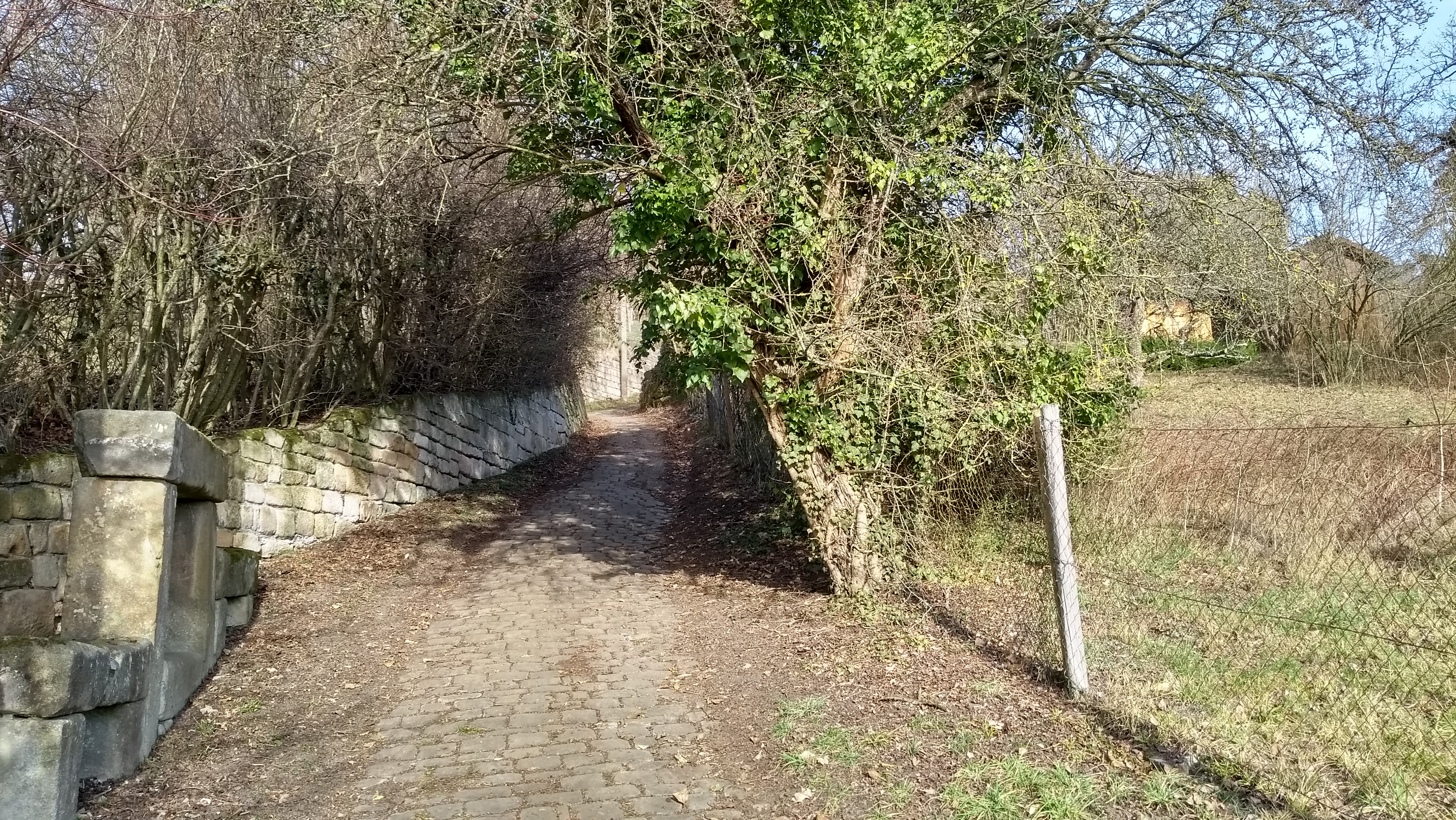 Pfauenbergsteige mit Ruhbank in Esslingen Liebersbronn